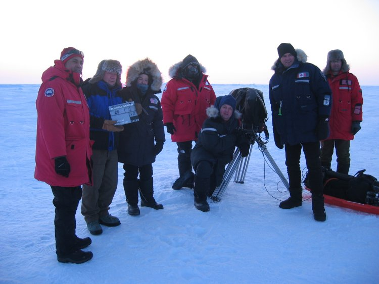 L'équipe de tournage de Stargate Continuum en Arctique